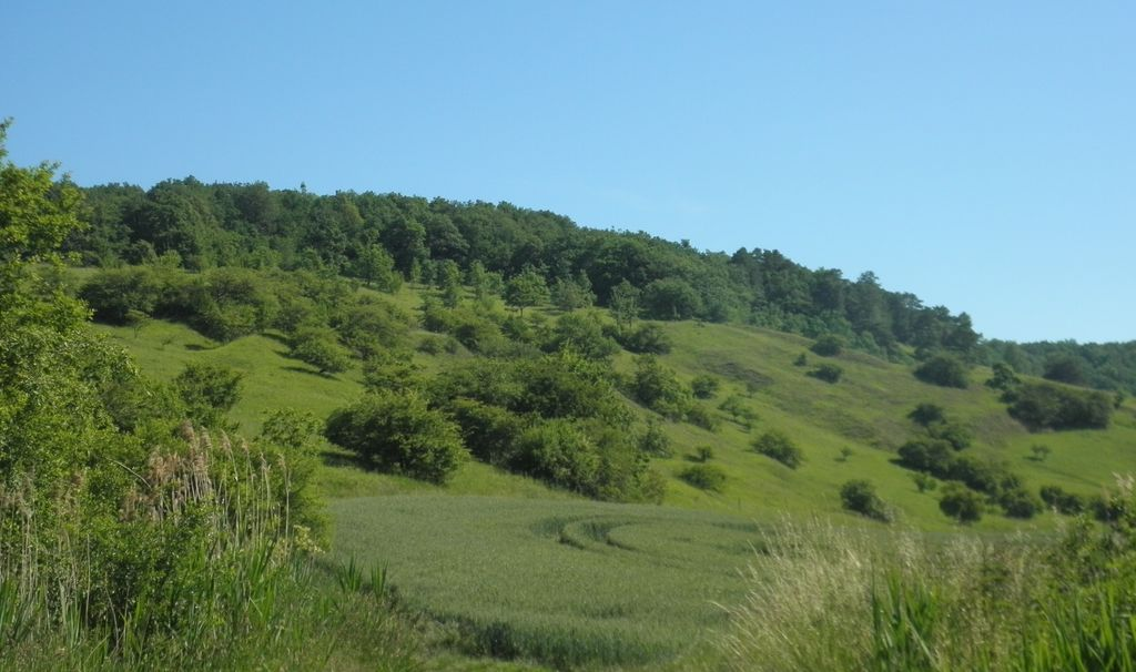 NPP Malhotky